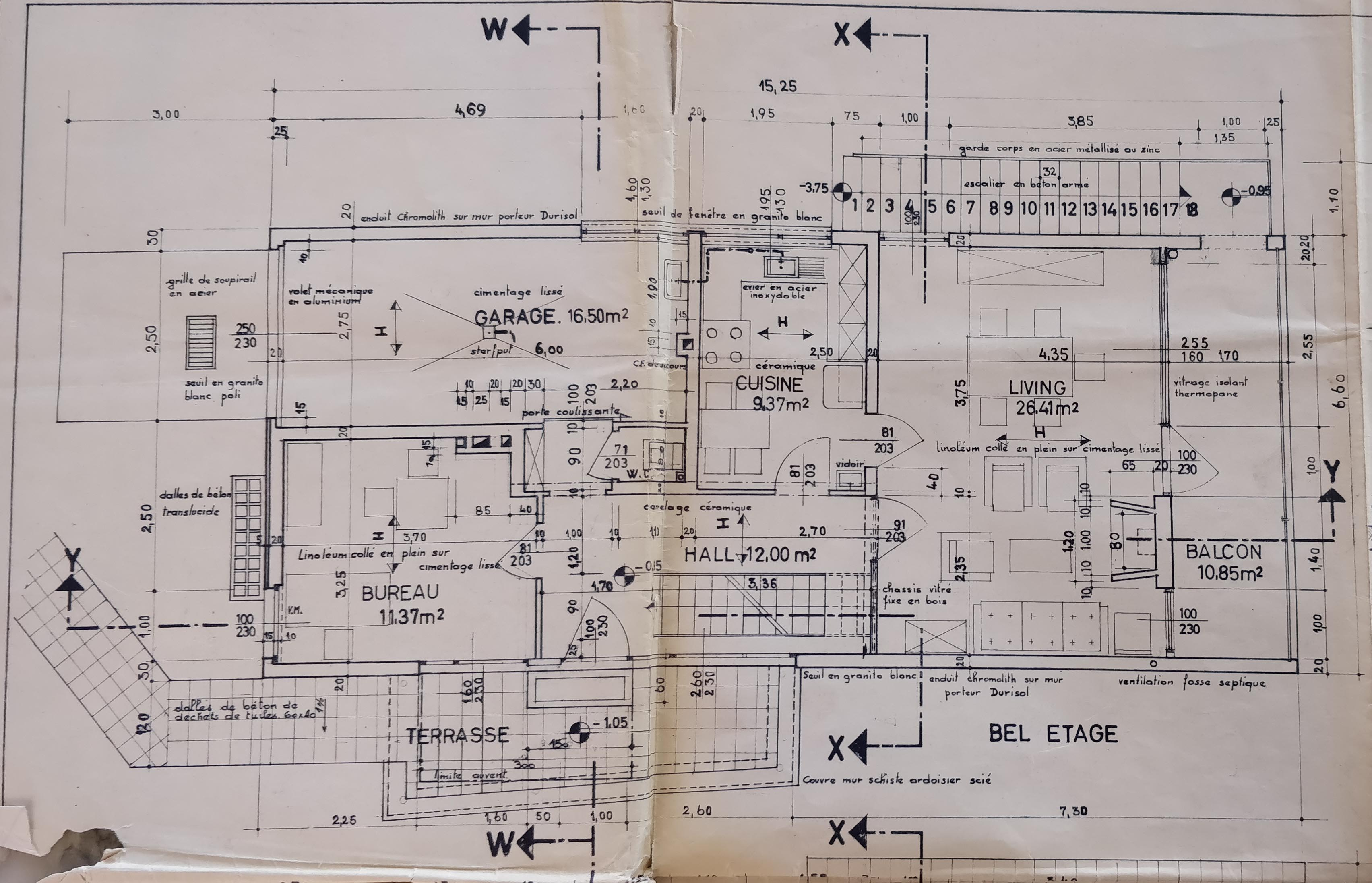 rdcjulesmozin